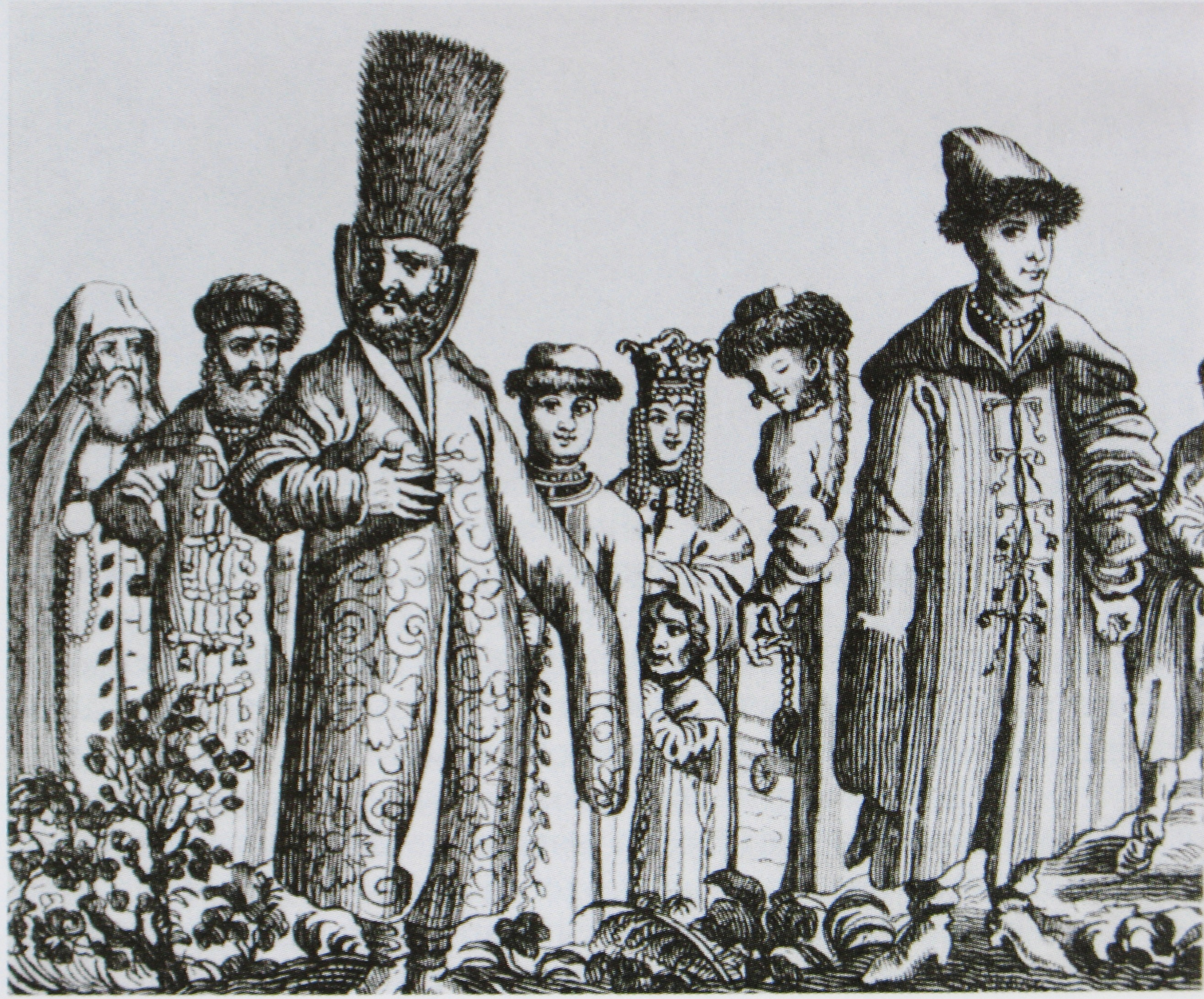 Русская знать.